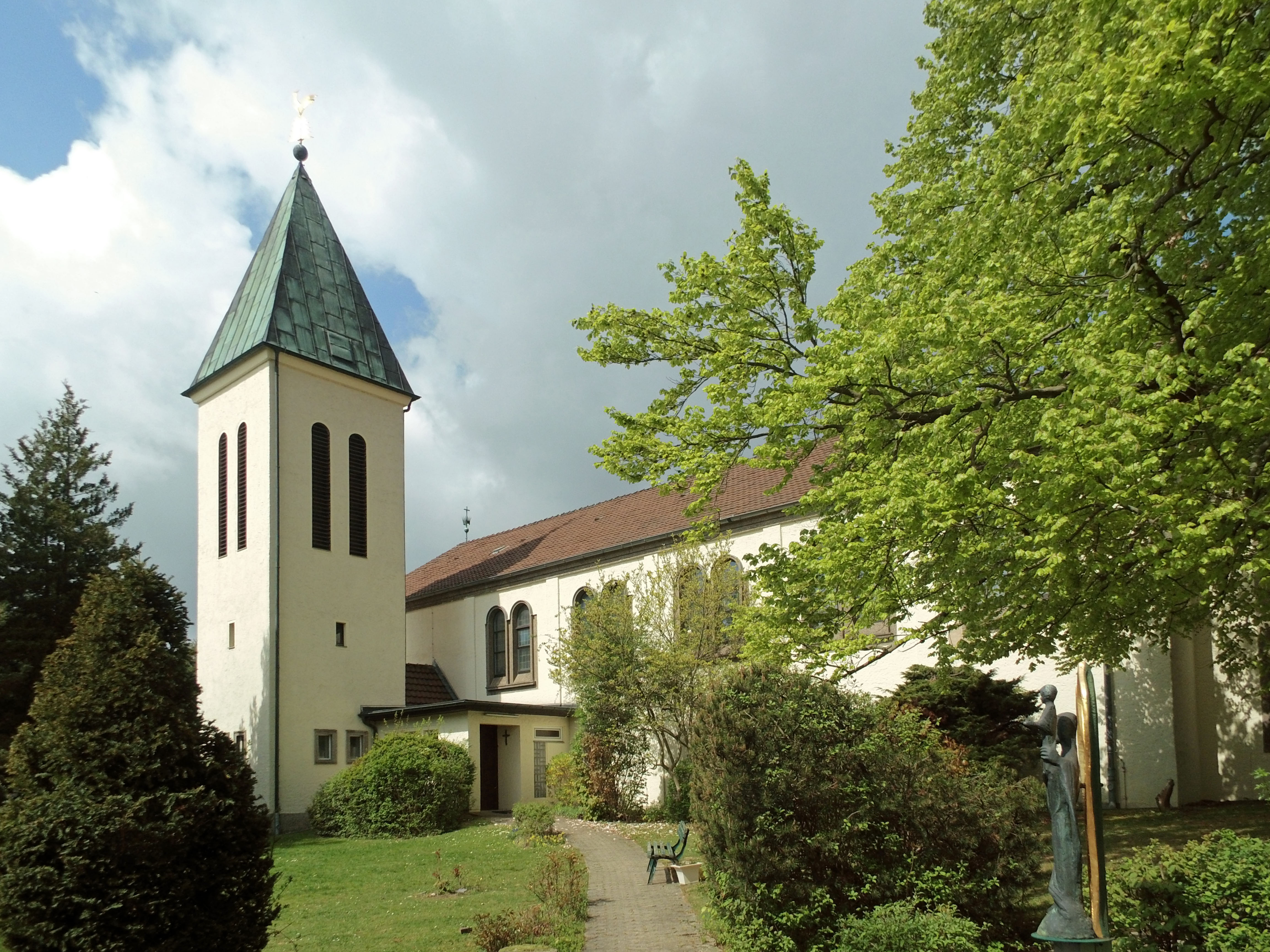 Römisch-katholische St.-Gabriel-Kirche in Salzgitter-Gebhardshagen.